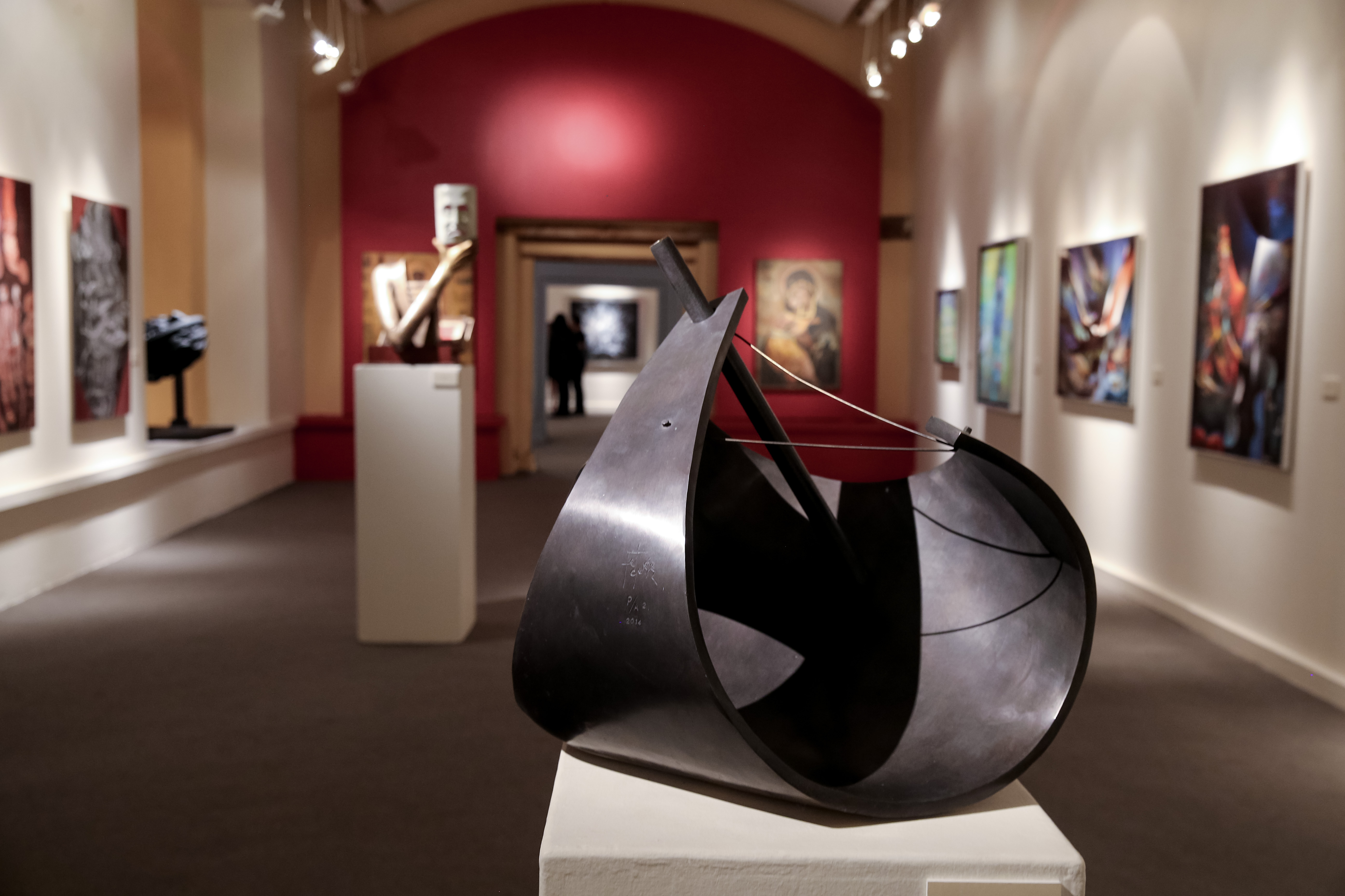 Museo José Luis Cuevas